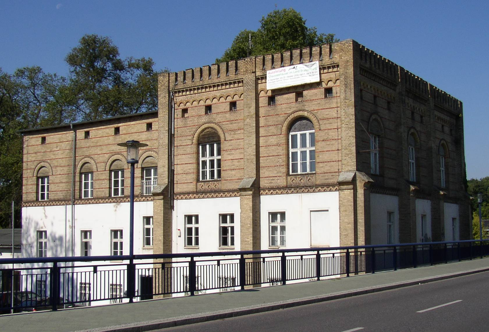 Nedlitzer Fährgut in Neu Fahrland (Ortsteil von Potsdam) in Brandenburg, Deutschland